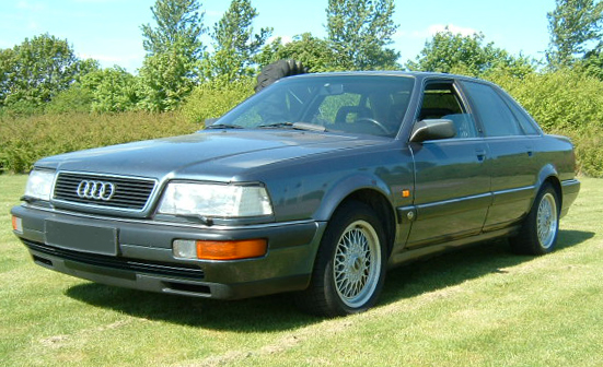 Audi V8 1991. Taget venstre for.